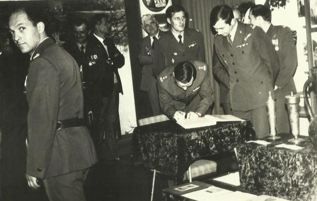 Stargard Szczeciński, 1989r. Uroczystość wojskowa w sali tradycji 8 br